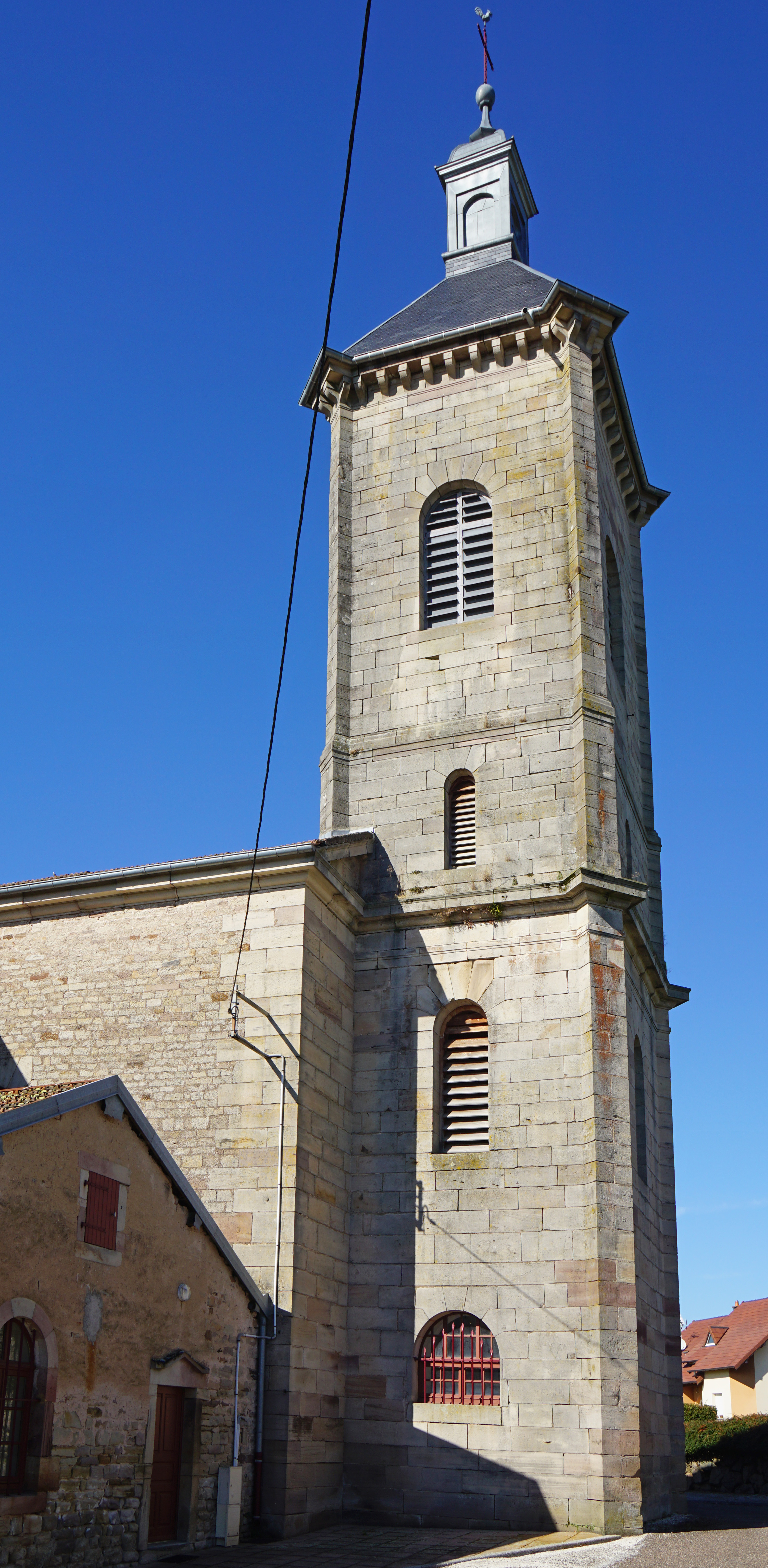 L'église de l'Assomption de Belmont.